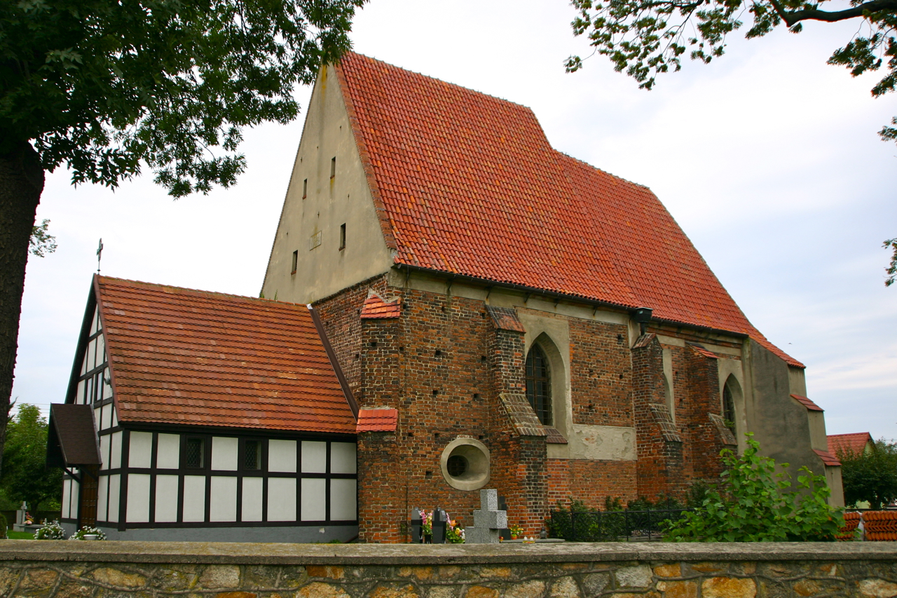 Tyniec Mały (niem. Klein Tinz) – kościół parafialny p.w. Wniebowzięcia NMP (zabytek nr rejestr. 1226/1813).